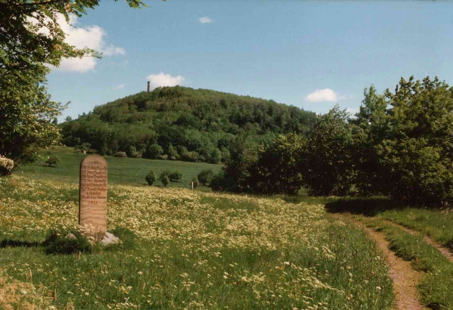 Markscheiderstein vor dem Geisingberg